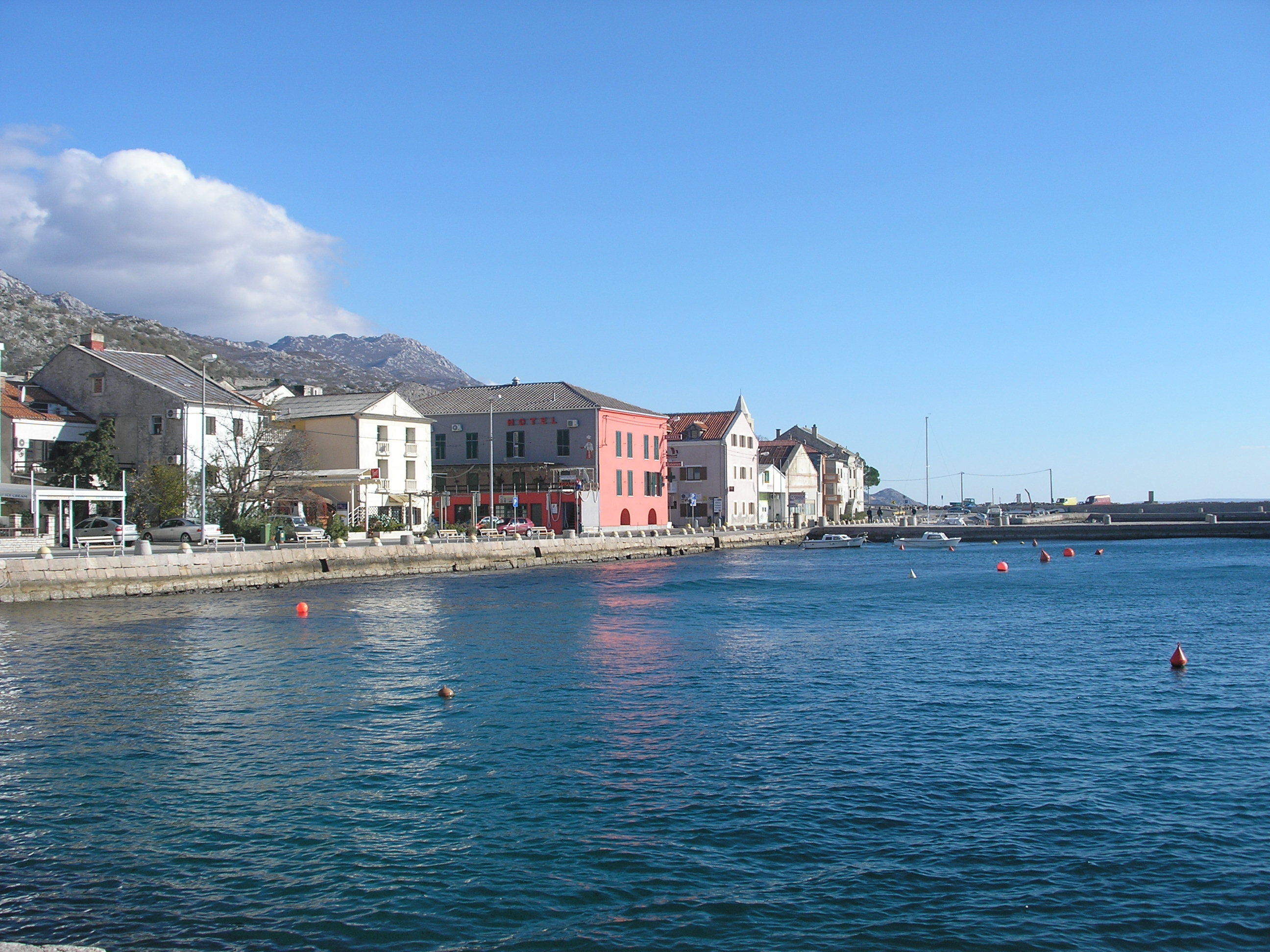 Karlobag, Croatia